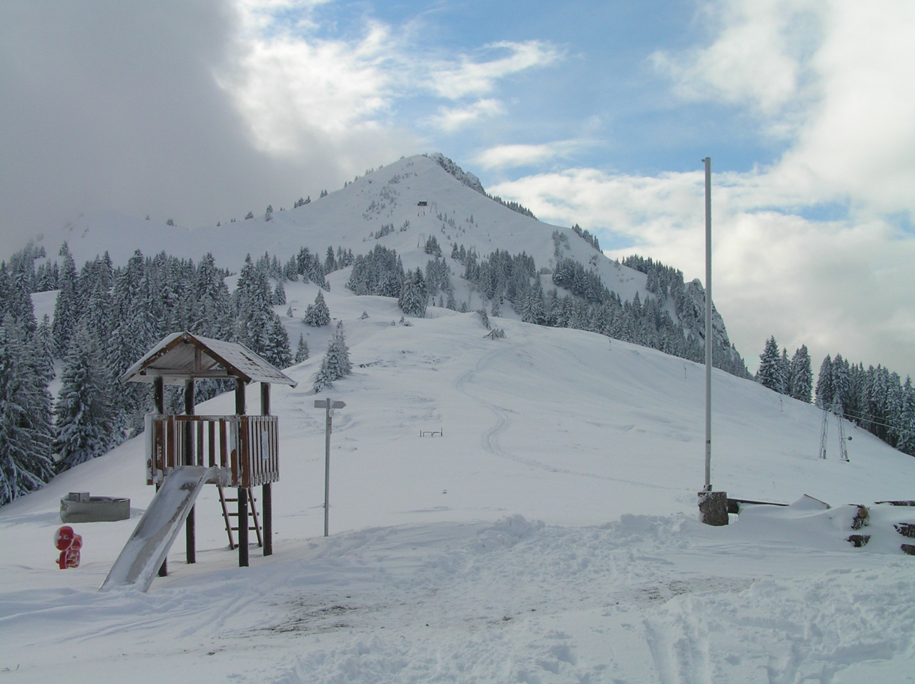 Der ostseitige Aufstieg zum Gipfel von der Grüntenhütte (1477m) aus gesehen (10.12.2006).